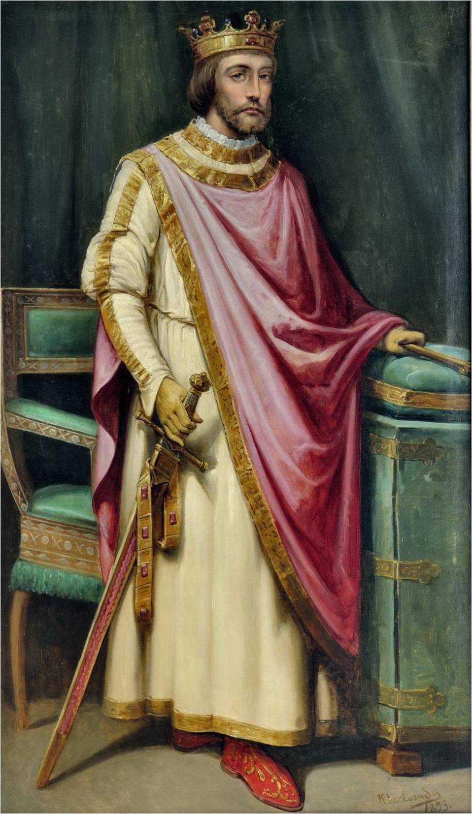 Retrato imaginario del rey Juan I de Castilla (1358-1390). Fue hijo del rey Enrique II de Castilla y de la reina Juana Manuel de Villena, hija del célebre don Juan Manuel. Intentó spoderarse del reino de Portugal pero fue aplastantemente derrotado en el sitio de Lisboa de 1384 y en la batalla de Aljubarrota, librada en 1385. Falleció en 1390 en Alcalá de Henares, a los 32 años de edad y fue sucedido en el trono por su hijo, Enrique III de Castilla.